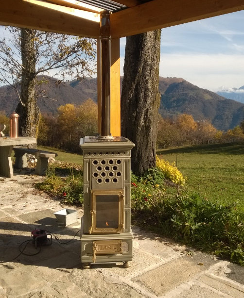 Kachle na pelety v oblasti La Castellamonte